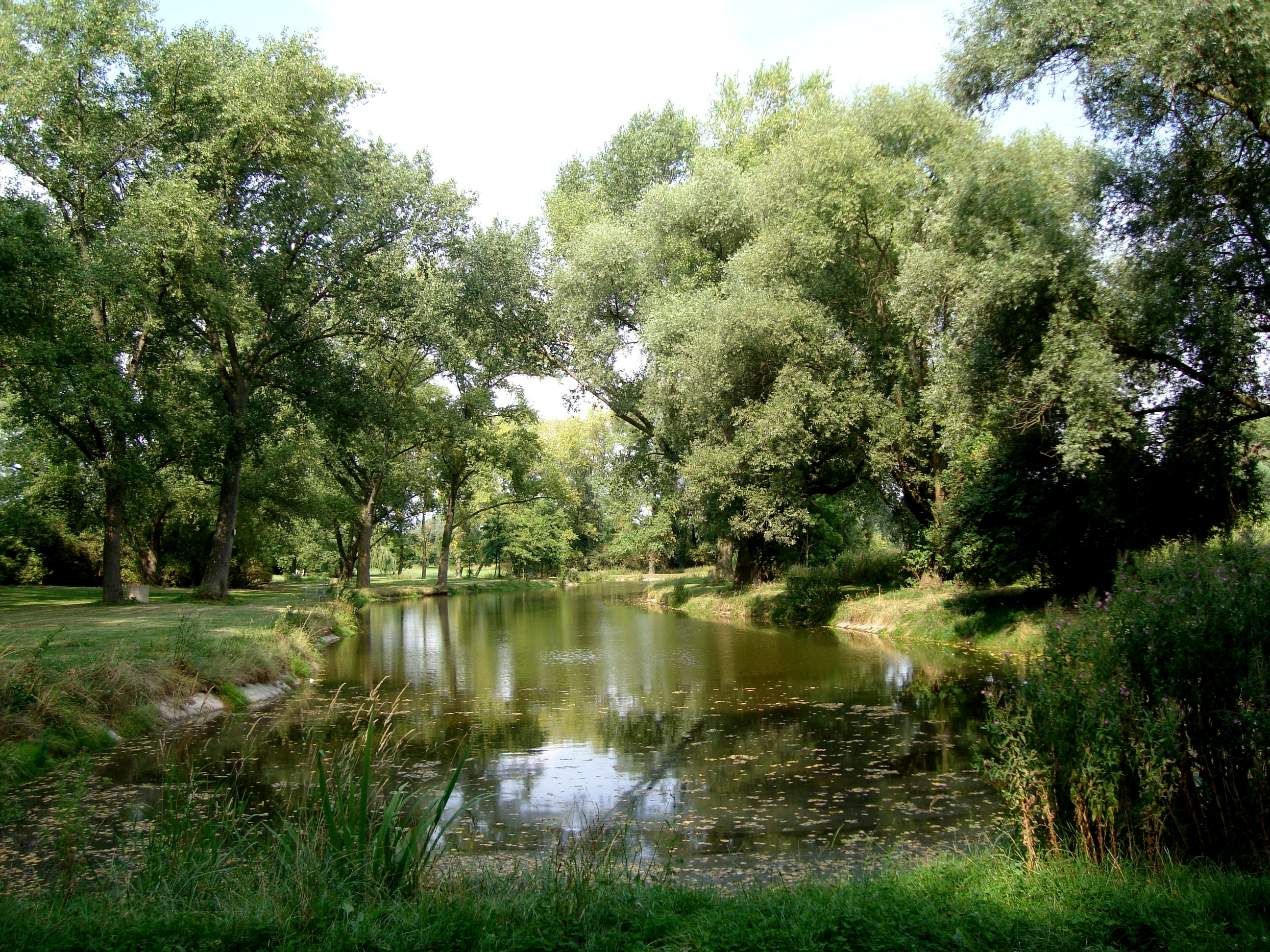 L'étang du bourg dans le parc de la Deûle à Wavrin (Nord).